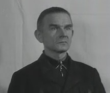 Johannes Georg Lörner, genannt Hans Lörner (* 6. März 1893 in München; † unbekannt) war ein deutscher SS-Oberführer. Lörner wurde in den Nürnberger Prozessen angeklagt und als Kriegsverbrecher verurteilt.